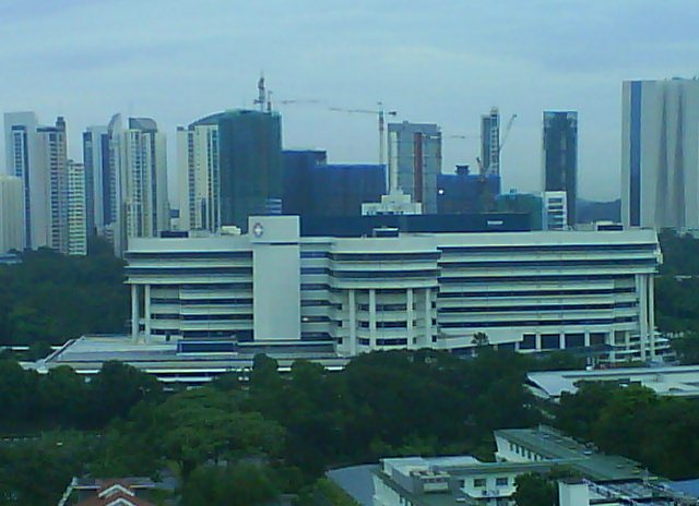 Kandang Kerbau Women's and Children's Hospital, Singapore